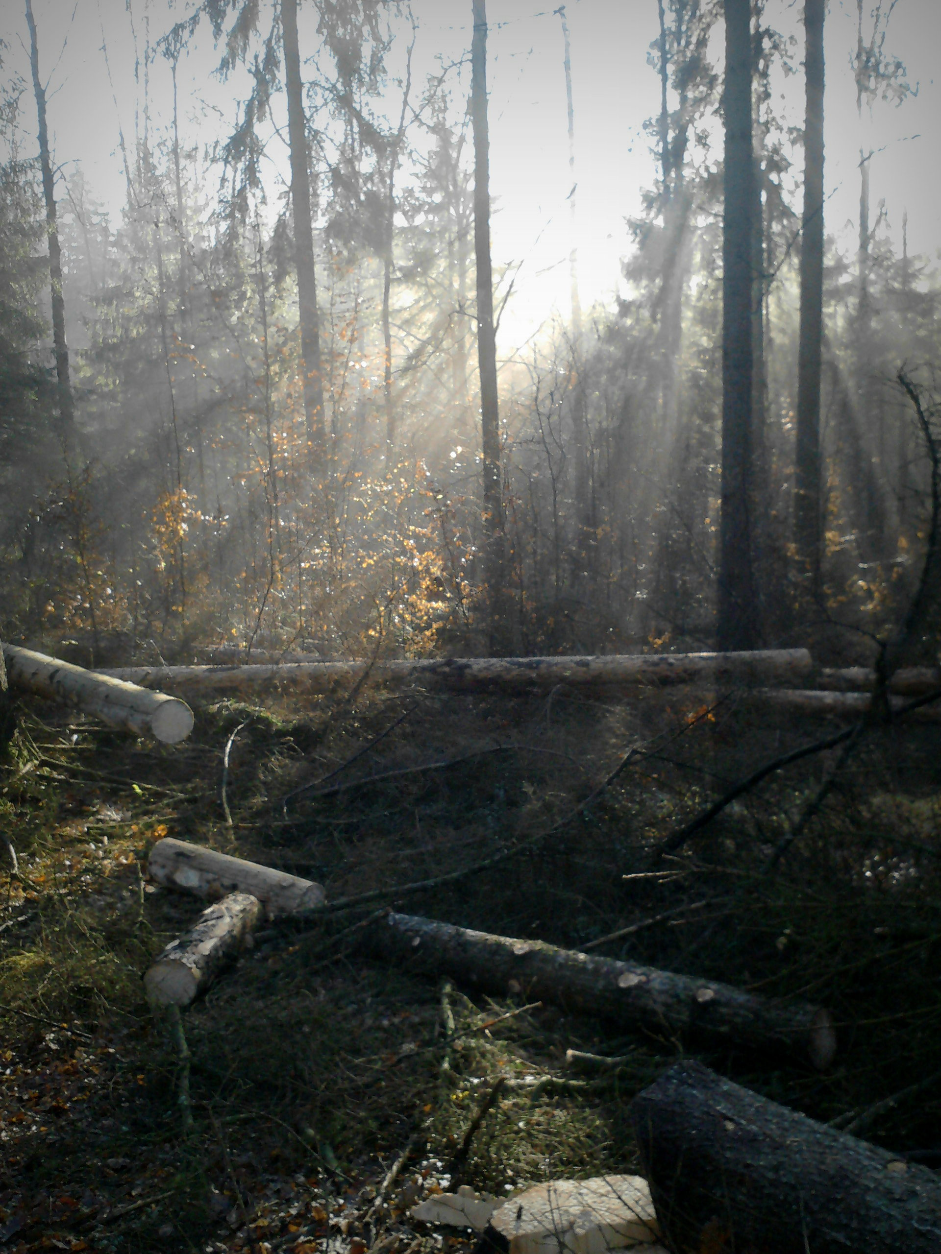 Autor: Adrian Grzegorz 25.11.2012